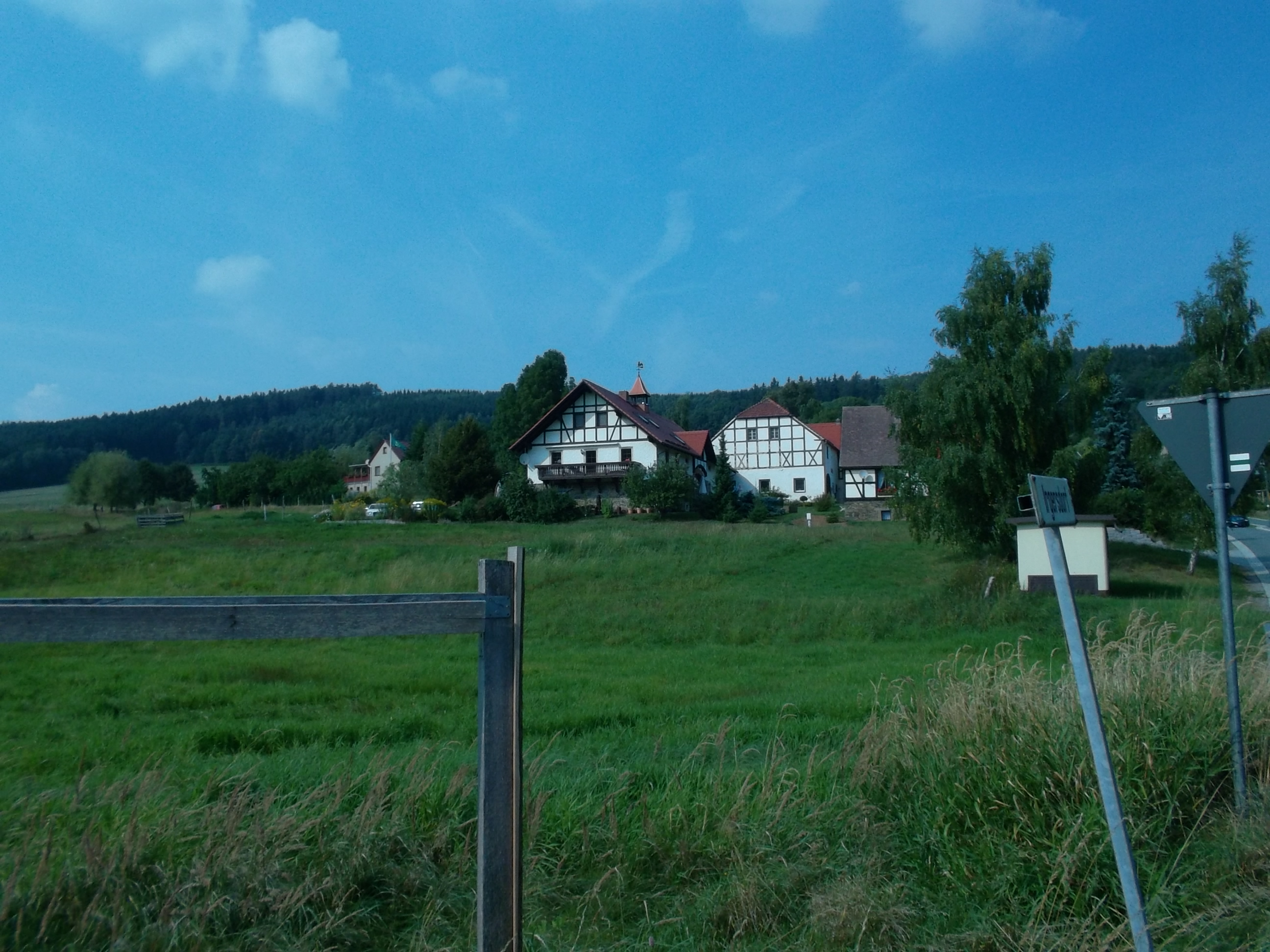 Ansicht von Irgersdorf